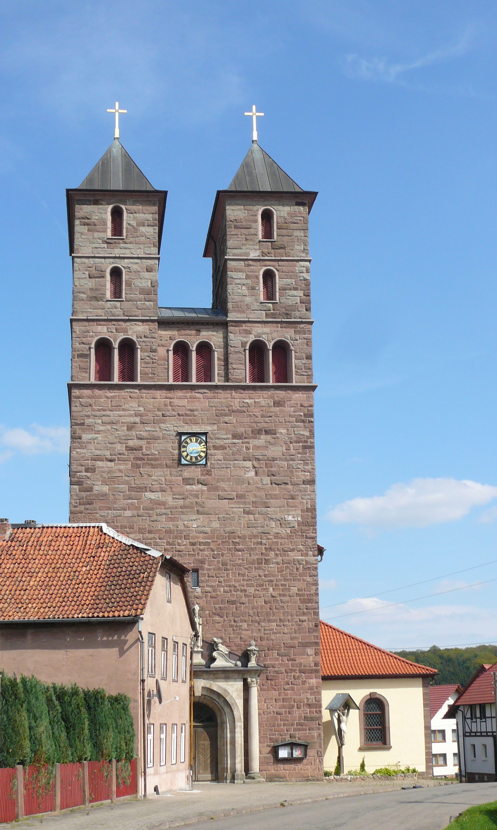 Kath. Pfarrkirche St. Nikolaus in Siemerode, Gemeinde Hohes Kreuz, Eichsfeld. Neuneoromanische Doppelturmfassade. Fertiggestellt 1955-1958